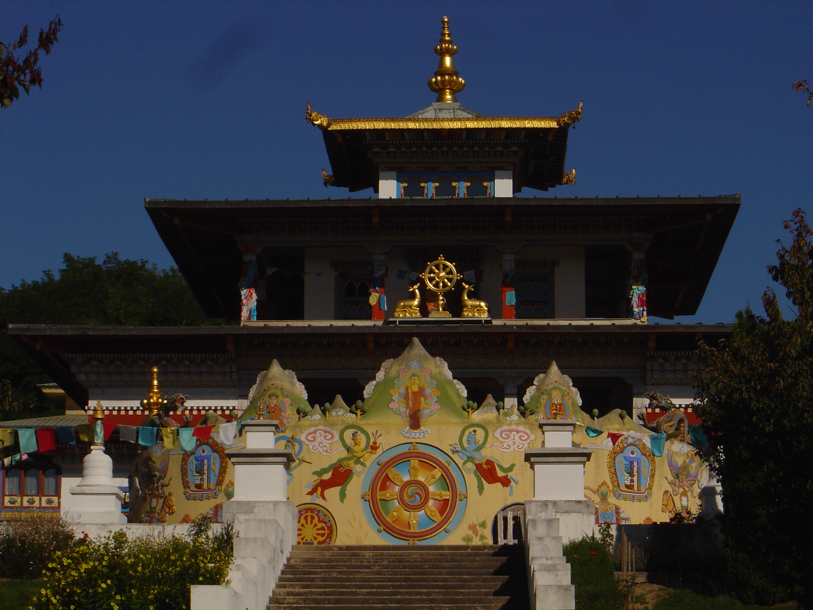 Temple des mille Bouddhas, Saône-et-Loire, Bourgogne, FRANCE